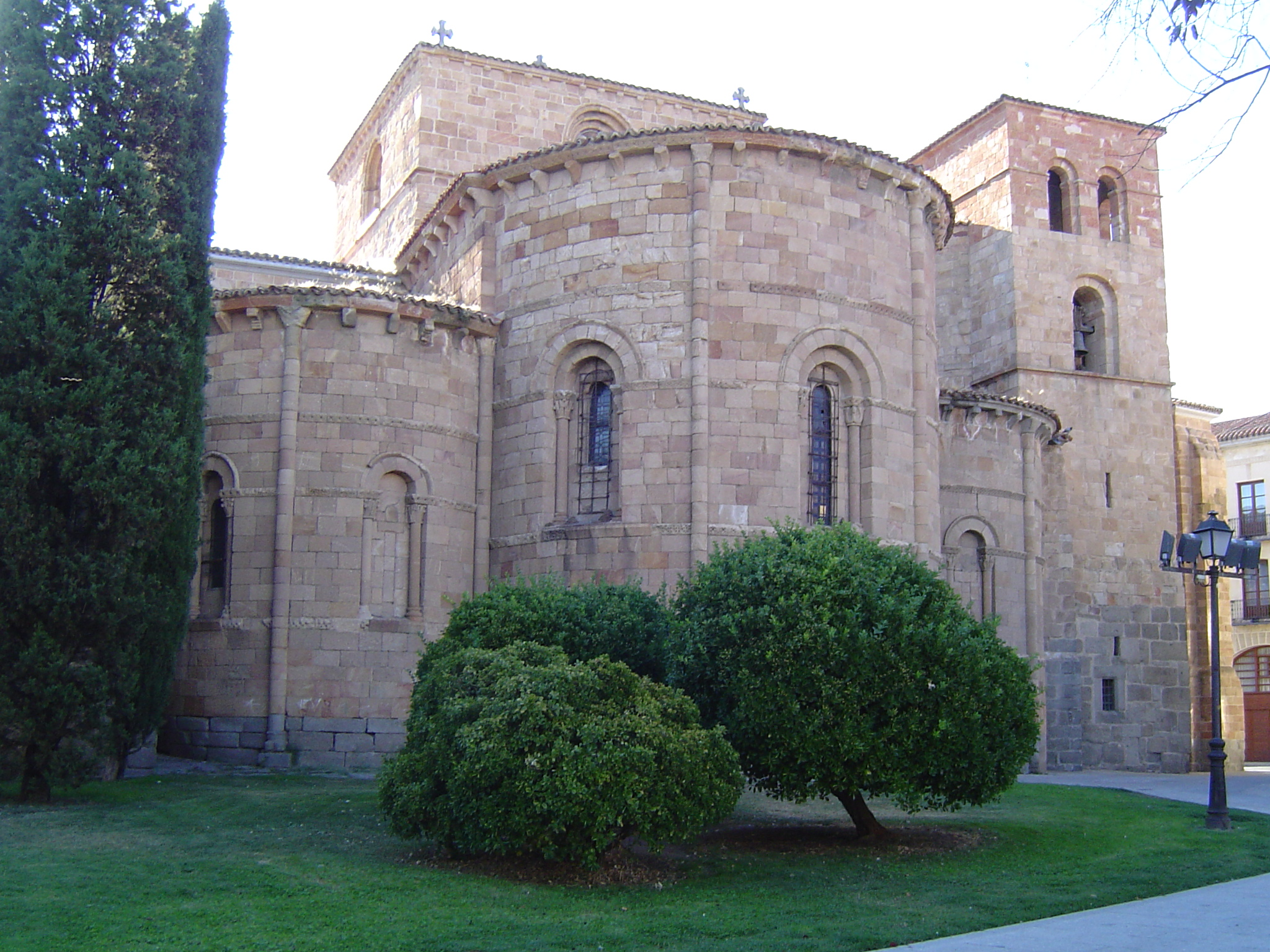 Ávila, iglesia de San Pedro